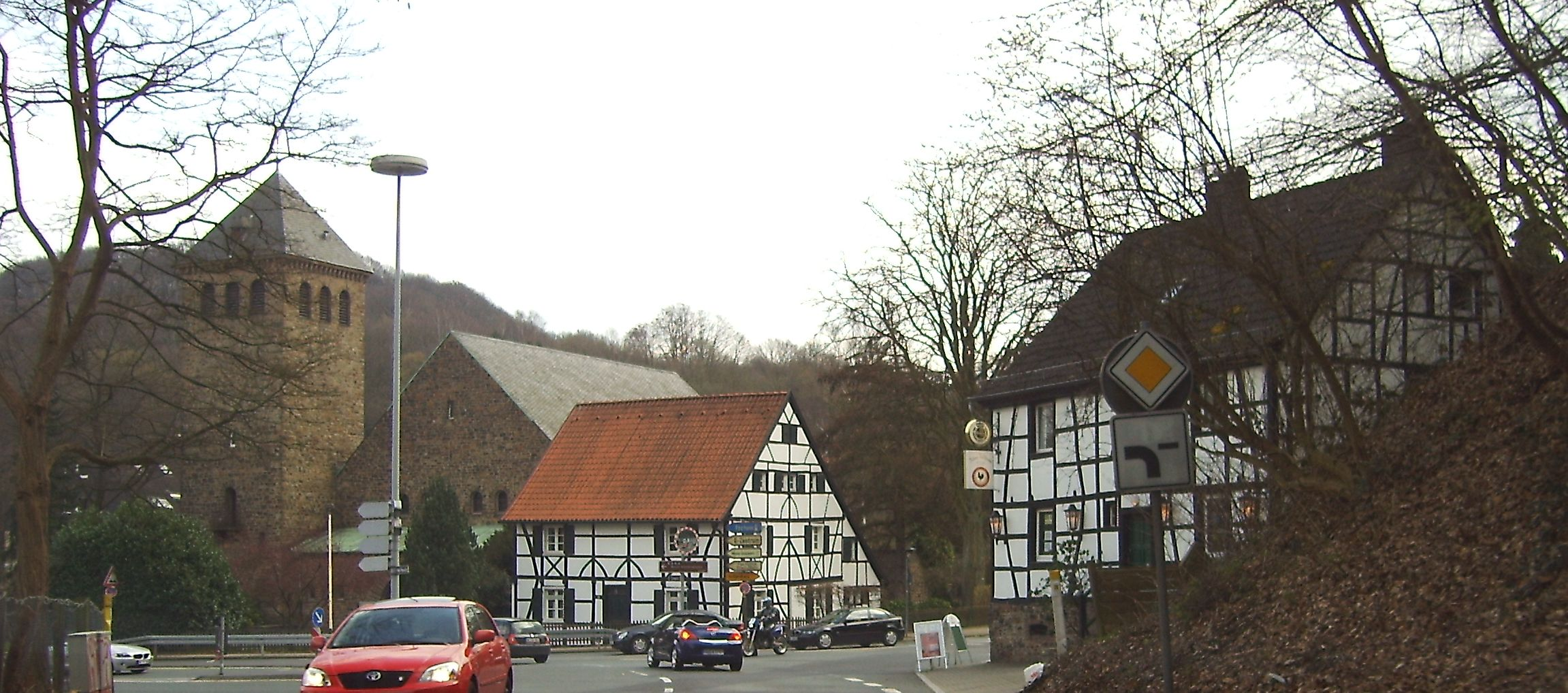 Essen-Kettwig, Ortsteil "Vor der Brücke", links kath Kirche St. Joseph